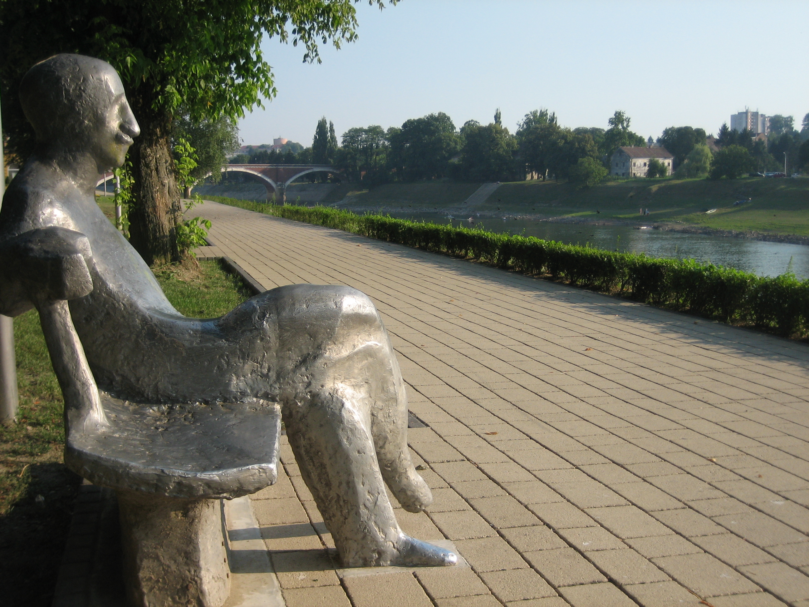 Monument to a croatian poet A. G. Matoš, in Sisak, Croatia. / Spomenik A. G. Matoša na sisačkoj Šetnici uz Kupu.